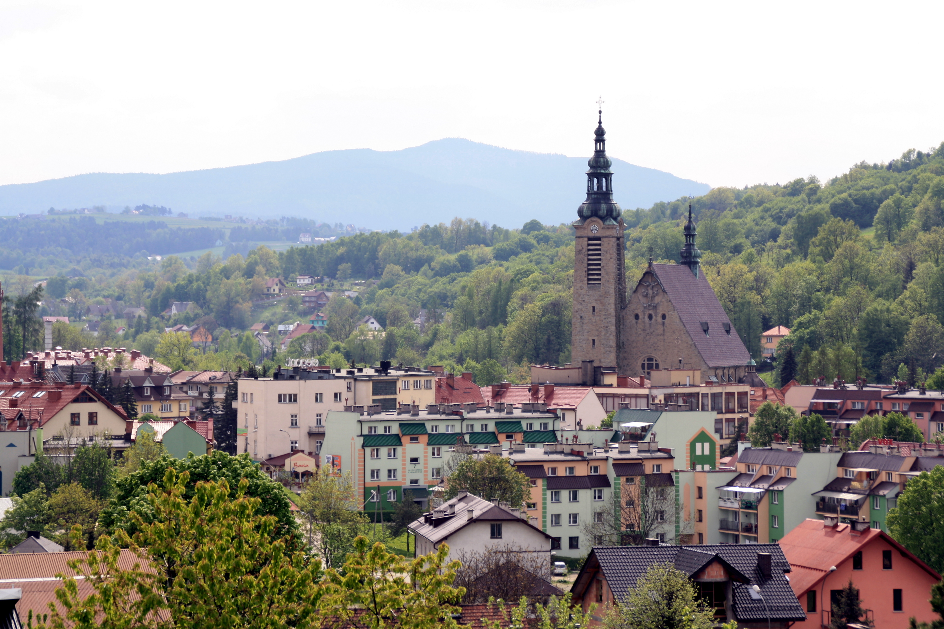 Limanowa, widok z ulicy Leśnej